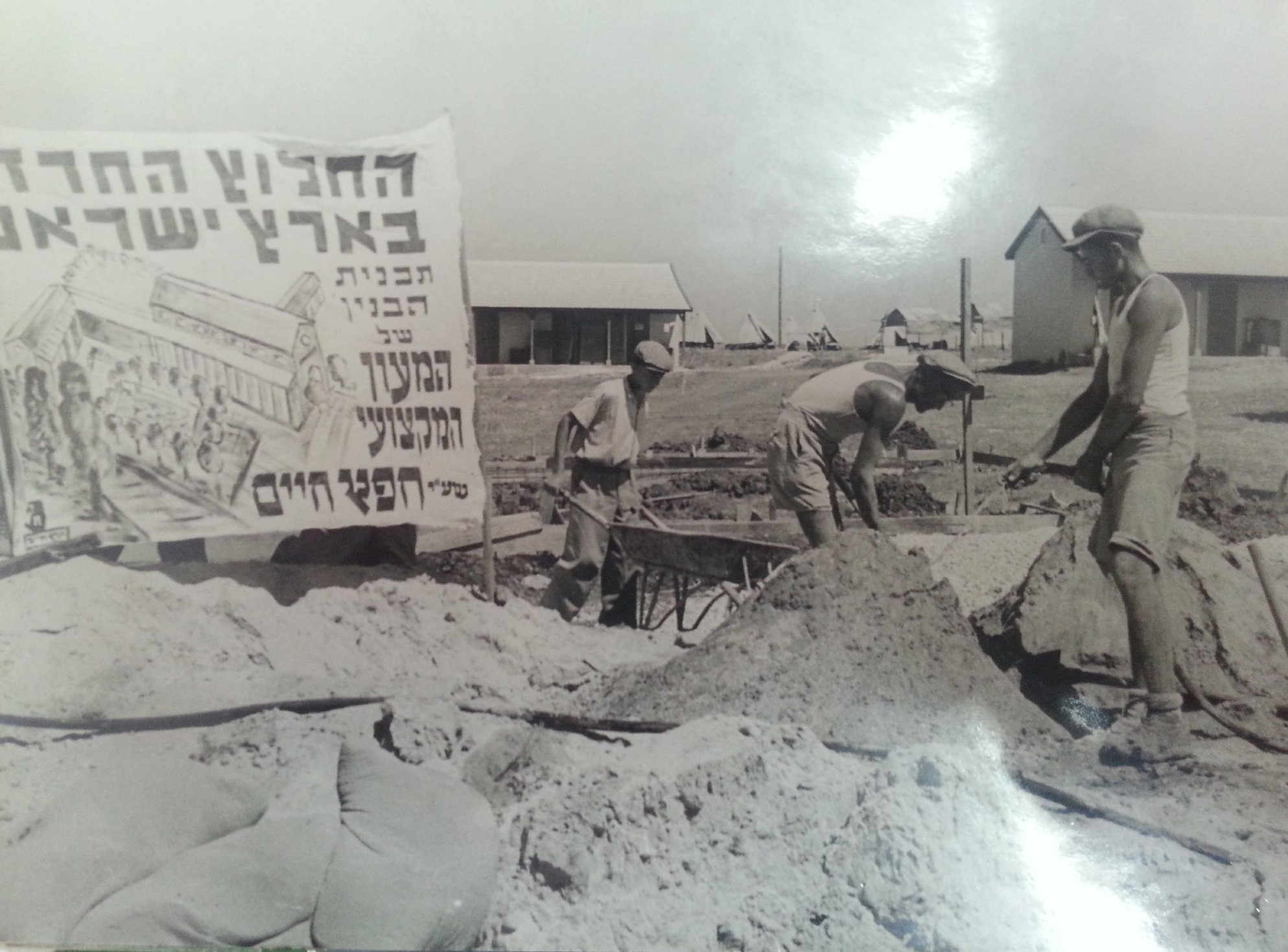 עבודות על הקמת הישוב חפץ חיים - 1944